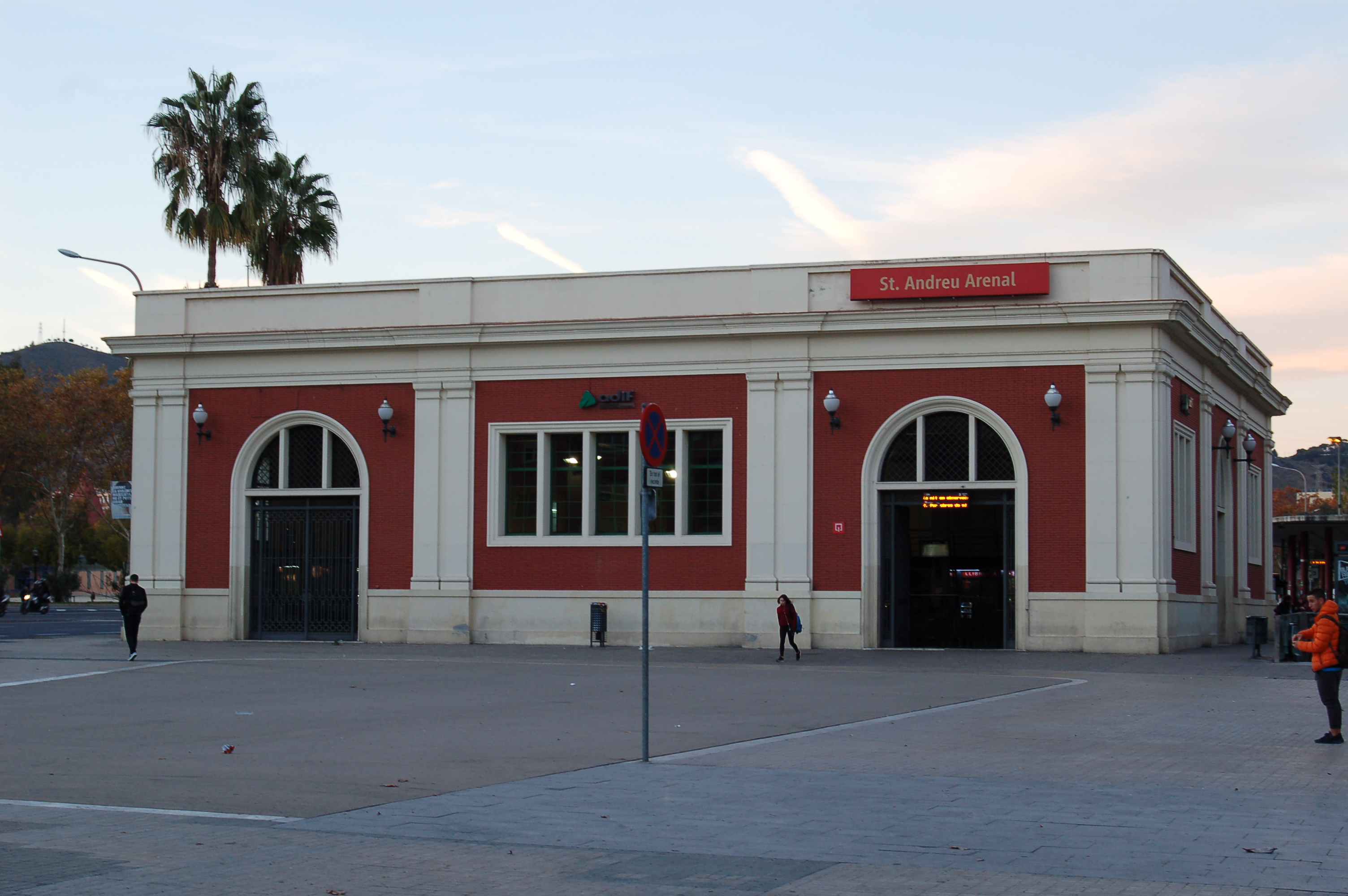 Estación de Renfe de Sant Andreu Arenal ubicada en la ciudad de Barcelona.